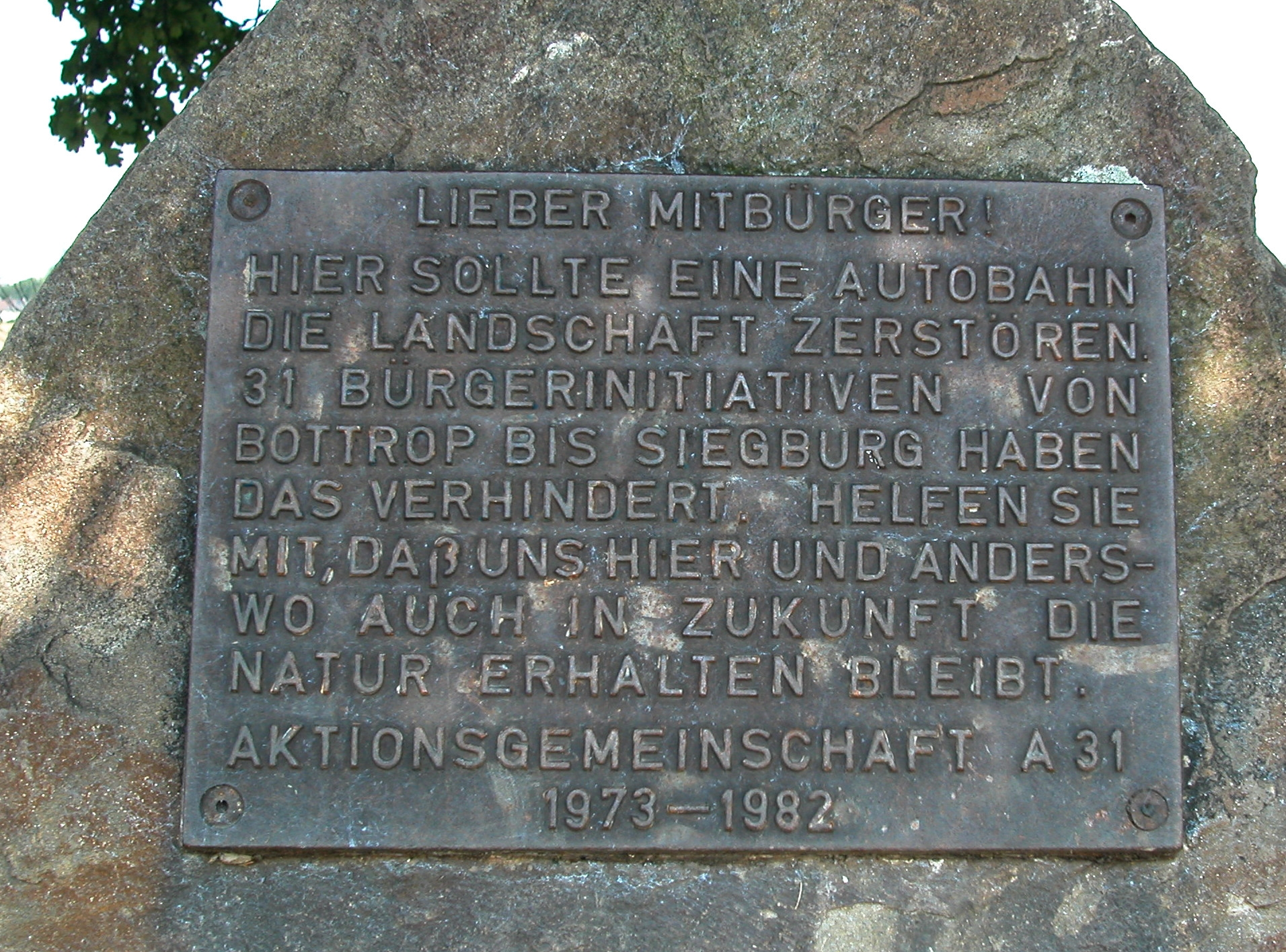 A31-Mahnmal, Tafel Position: Riemelsbeck 51°25′11.70″N 6°56′41.54″E / 51.419917°N 6.9448722°E